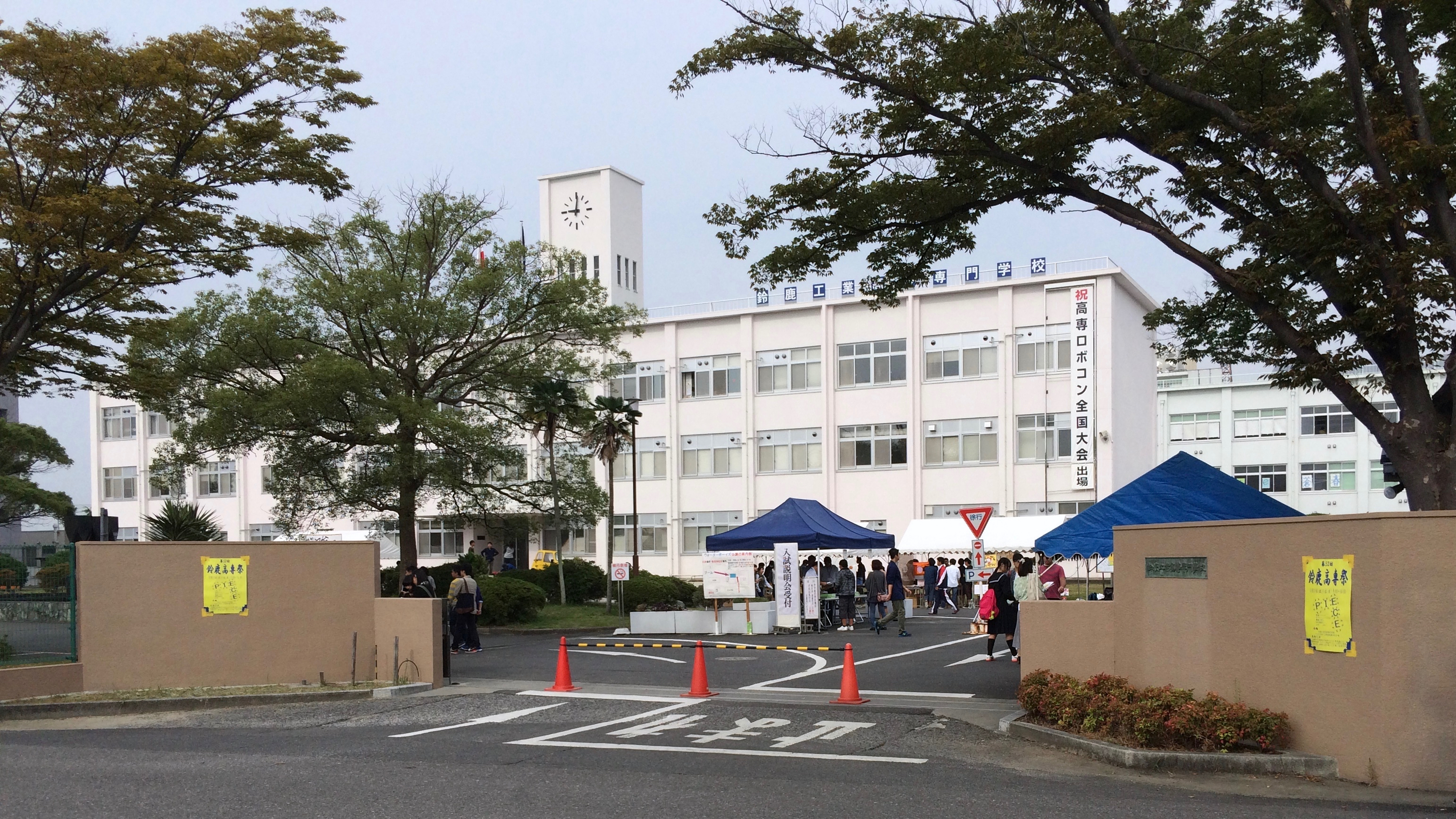 第52回鈴鹿高専祭で賑う、鈴鹿工業高等専門学校正門